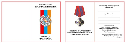 II աստիճանի «Մարտական խաչ» շքանշանի վկայական